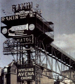 Stomatolskylten på Katarinahissen i Stockholm, innan den flyttades